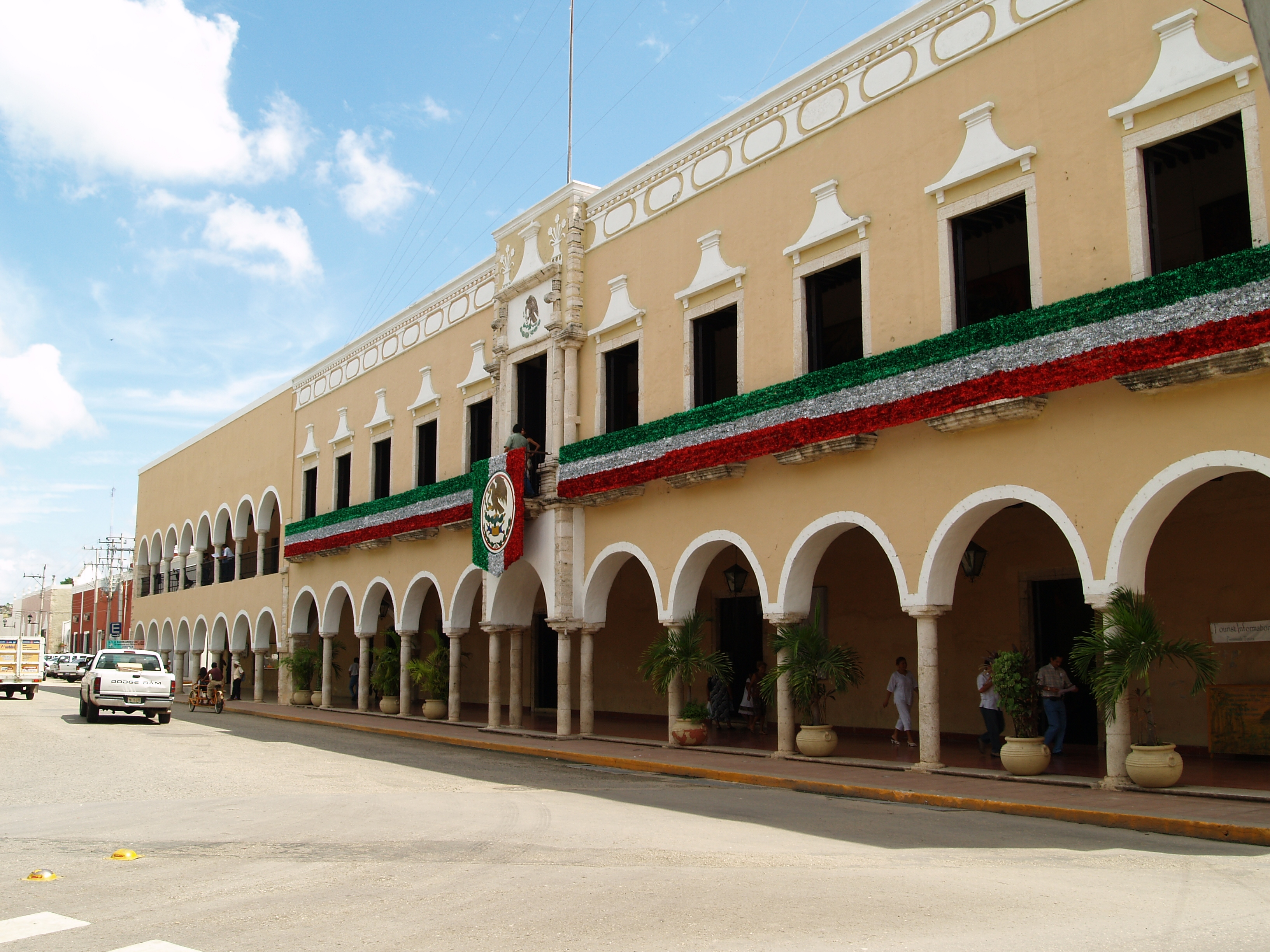 Valladolid - centro